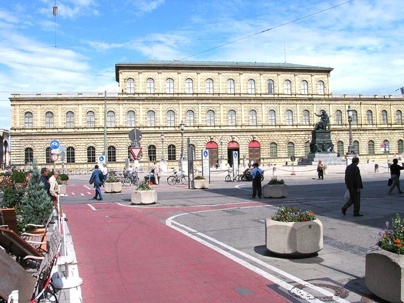 Residenz, Königsbau, München, Bayern, Deutschland